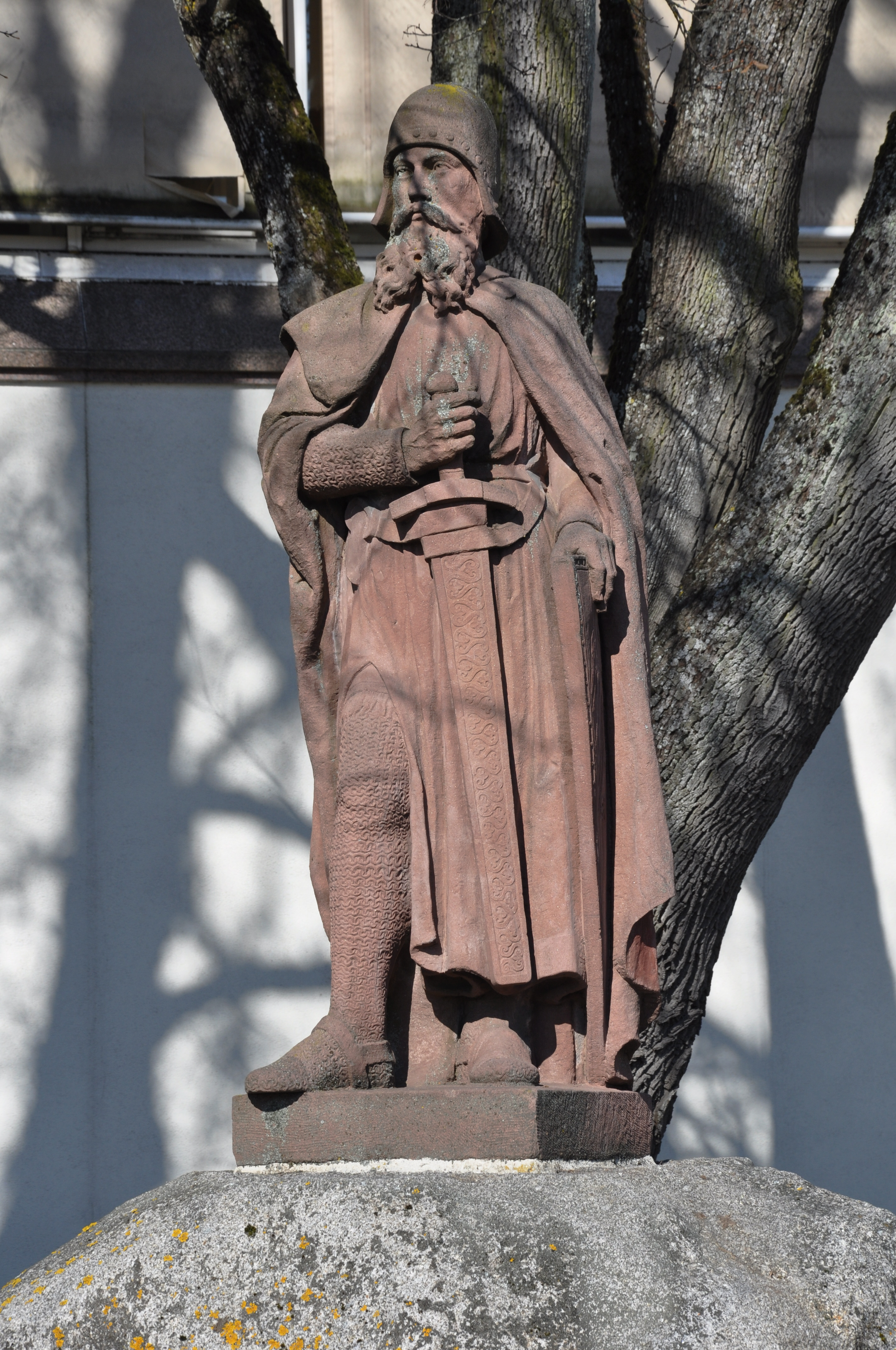 Villingen-Schwenningen, Stadtbezirk Villingen Graf-Berthold-Denkmal am Ring (Berthold II., Graf im Breisgau und Thurgau)